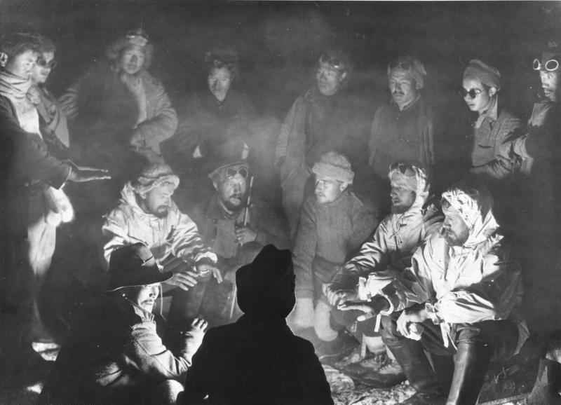 Tibetexpedition, Expeditionsteilnehmer Zemugebiet, Expedition am Lagerfeuer [von links nach rechts: Krause, Schäfer, Beger, Geer, Wienert] Abgebildete Personen: Beger, Bruno Dr.: SS-Hauptsturmführer, Abteilungsleiter Sven-Hedin-Institut, Deutschland (GND 128720654) Schäfer, Ernst Dr.: SS-Sturmbannführer, Leiter des Sven-Hedin-Institutes, Deutschland (GND 123991420) Krause, Ernst: Mitarbeiter im Sven-Hedin-Institut, Deutschland